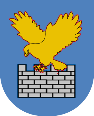 Stemma de la Regione Friuli-Venezia Giulia